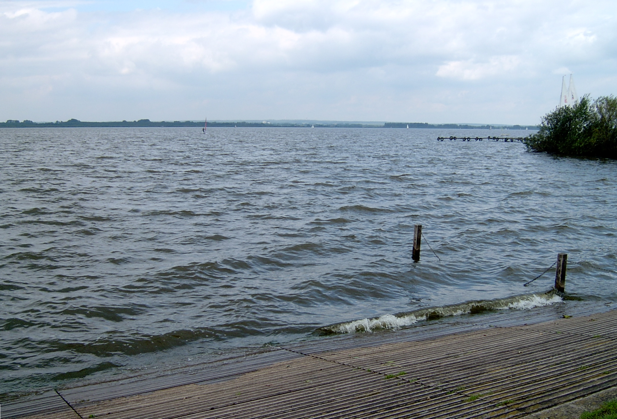 Dümmer in Niedersachsen, background: Dammer Berge